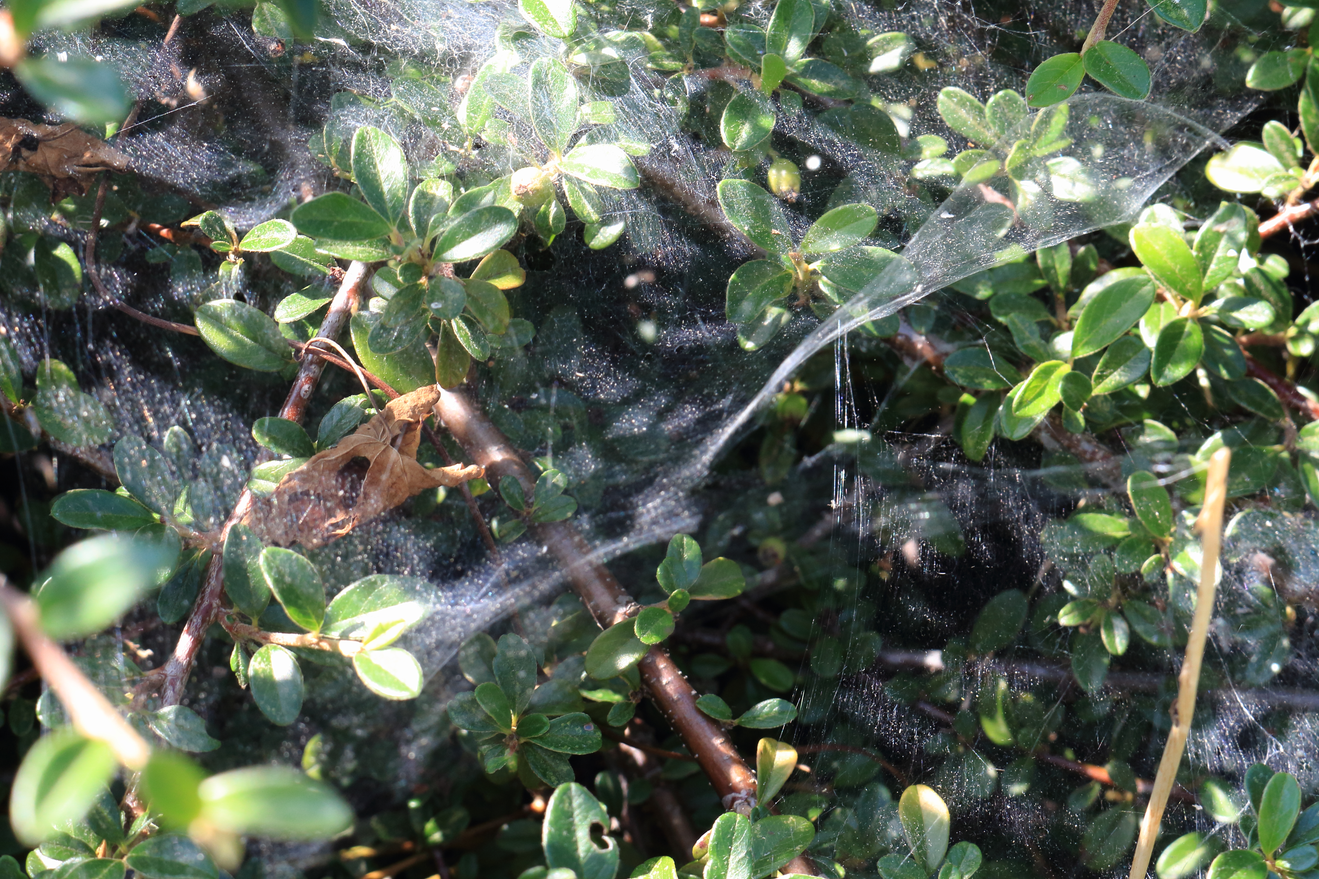 Trichter-Spinnennetze von Allagelena gracilens in der Hecke Die abgebildete Spinne/das Netz wurde am 14. Juli 2015 von Mhohner auf WP:RBIO/B bestimmt The spider/the web shown here has been identified from Mhohner on WP:RBIO/B 2015, July 14th